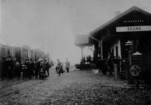 Auswanderer nach Argentinien im Bahnhof Egling